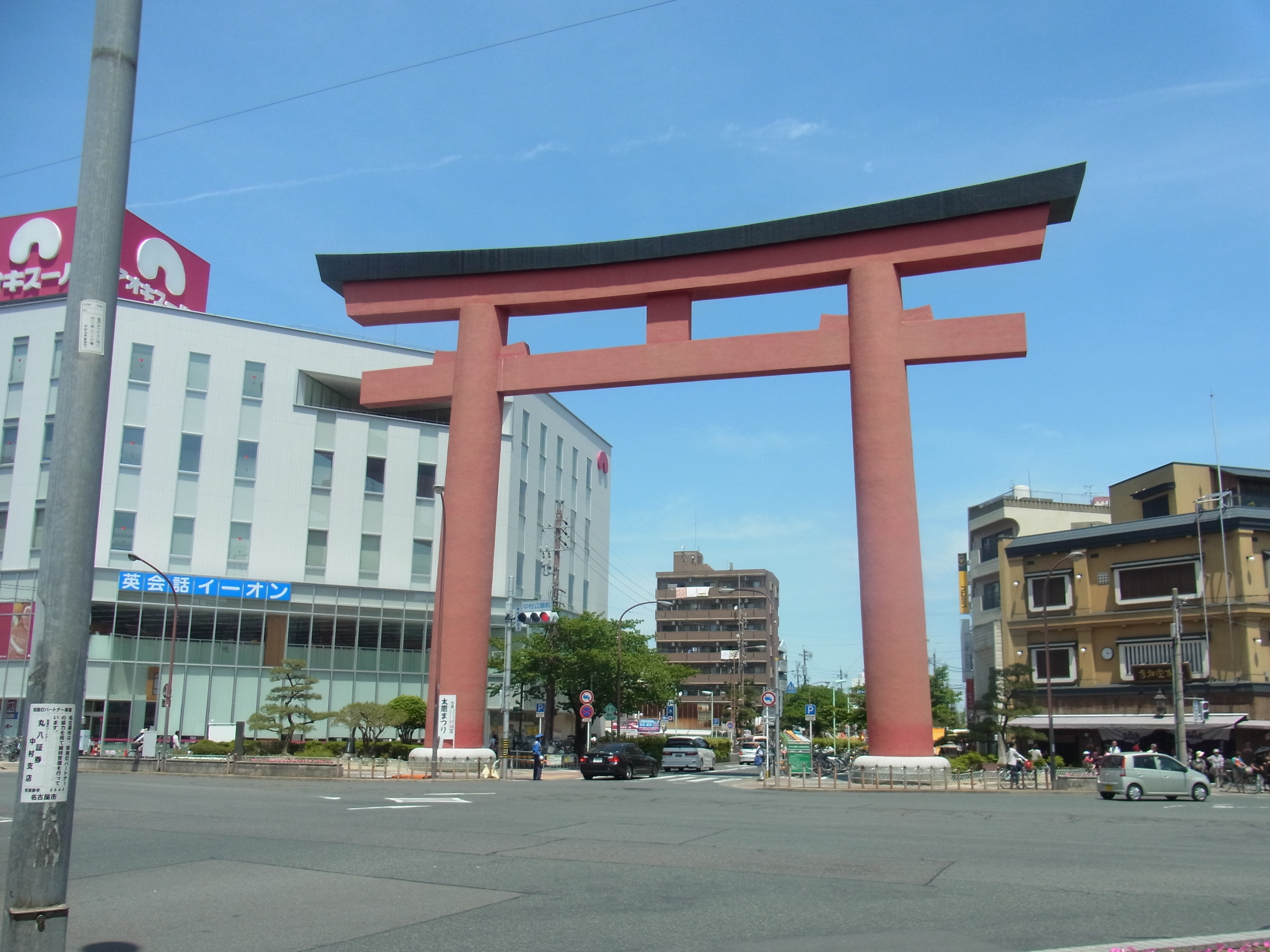 中村公園の大鳥居